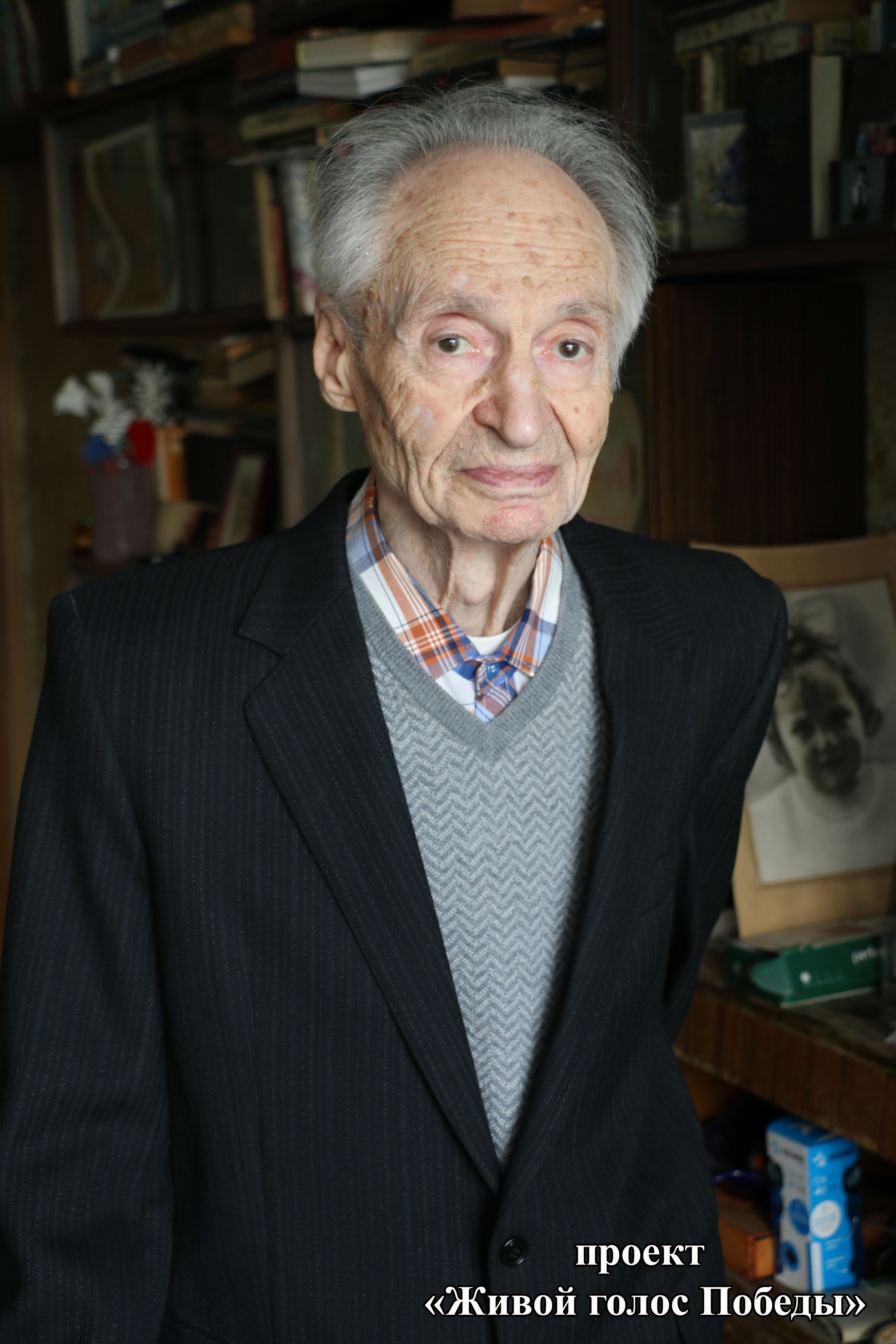 Илья Наумович Крупник у себя дома, октябрь 2019 г.